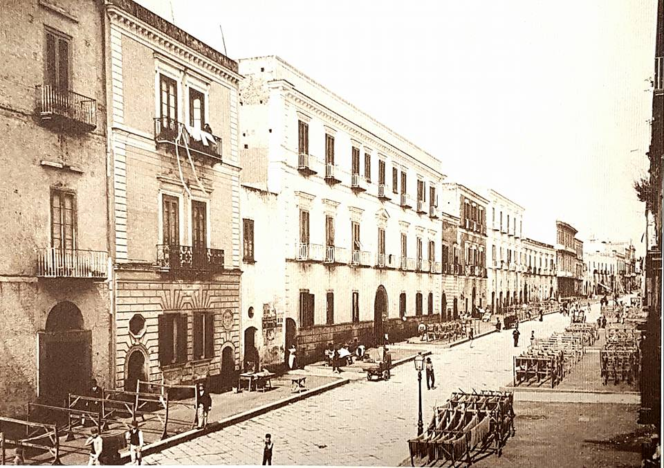 Carlo Brogi (1850-1925) - "Contorni di Napoli - Torre Annunziata". Pastifici a Torre Annunziata (NA): essiccazione della pasta lungo la strada principale. Numero di catalogo: 10295.